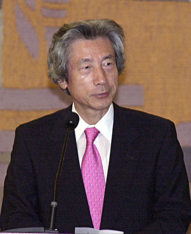 O primeiro-ministro do Japão Junichiro Koizumi.